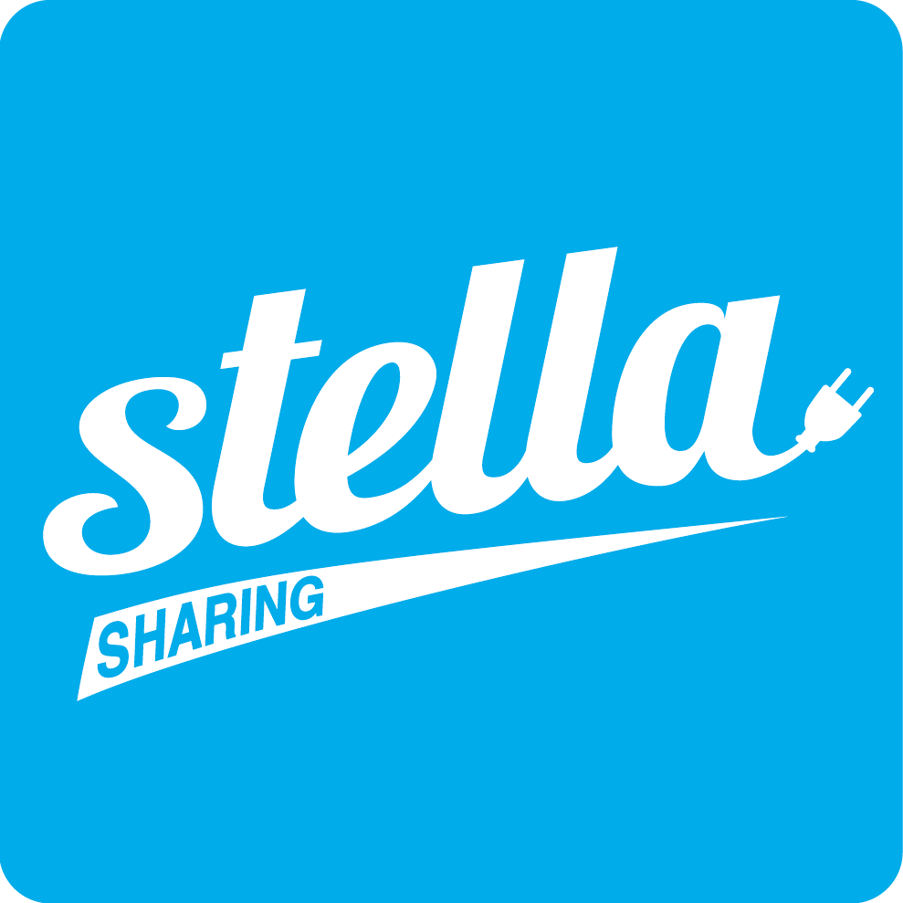 Das Kampagnenmotiv von stella-sharing, dem Konzept zur Elektromobilität der Stadtwerke Stuttgart.